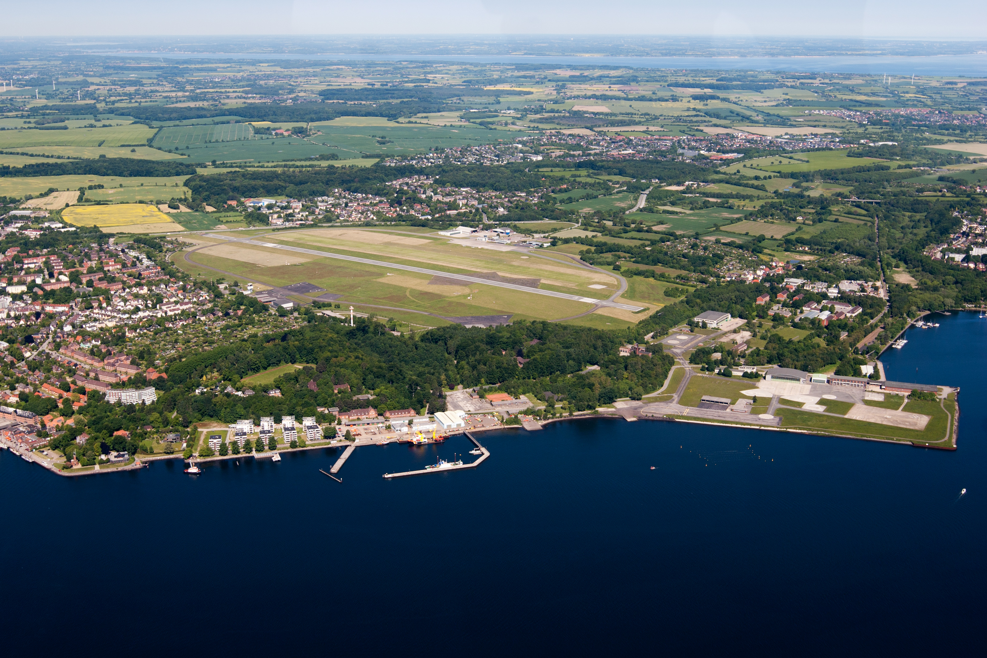 Luftaufnahme des Verkehrslandeplatzes Kiel-Holtenau (EDHK) und des Heliport Kiel-Holtenau (ETMK)